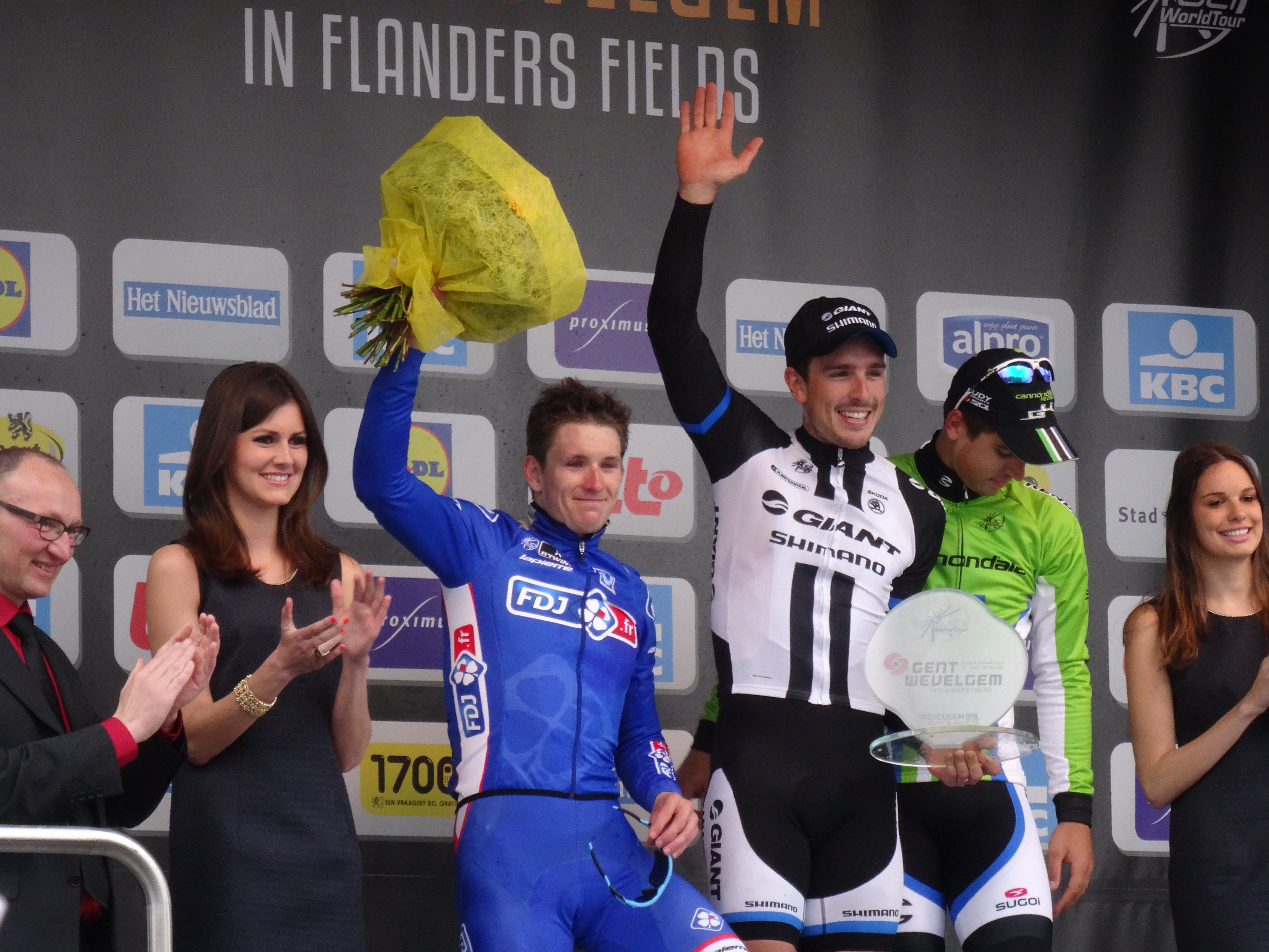 Reportage photographique réalisé le dimanche 30 mars à l'occasion de l'arrivée de Gand-Wevelgem 2014 à Wevelgem, Belgique.